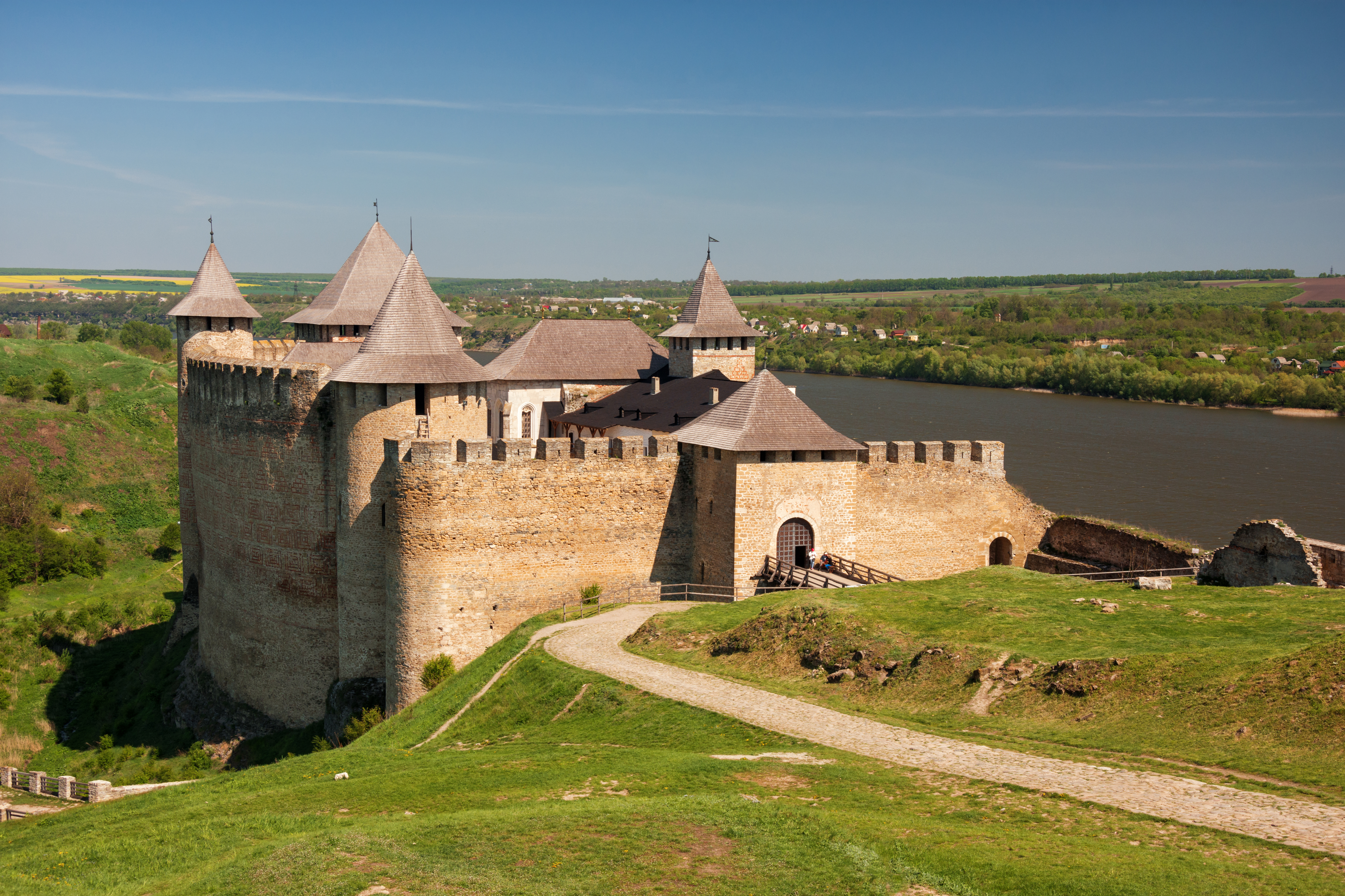 Комплекс споруд фортеці, Хотин, вул. Фортечна